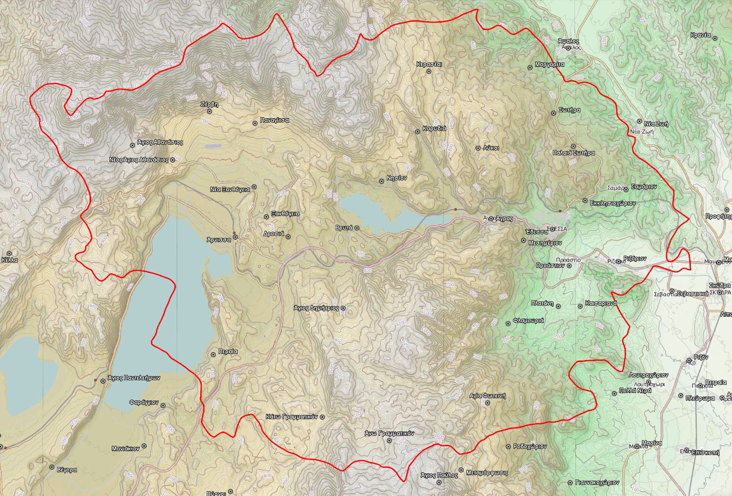 Τοπογραφικός χάρτης του Δήμου Έδεσσας